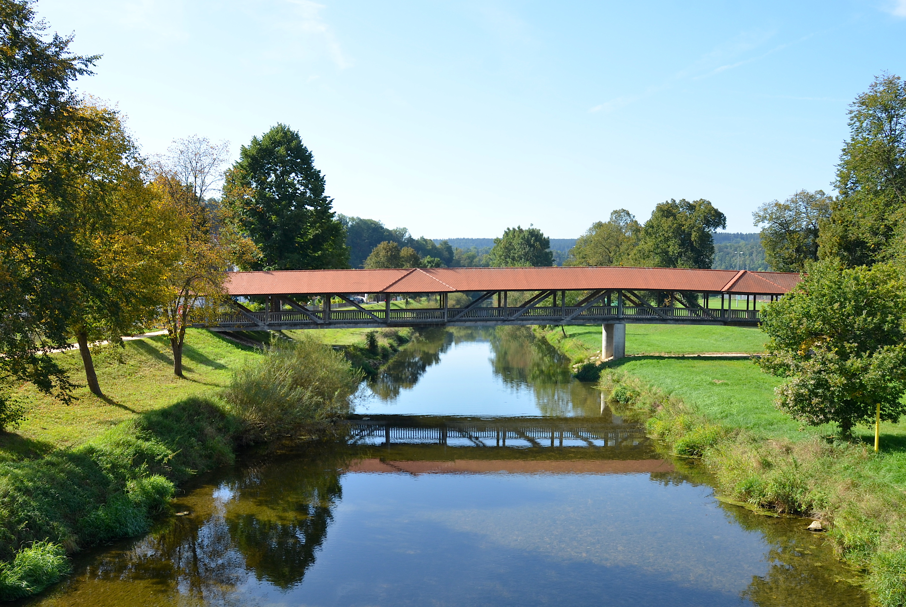 Nanteuiler Brücke in Fridingen (Baden-Württemberg)